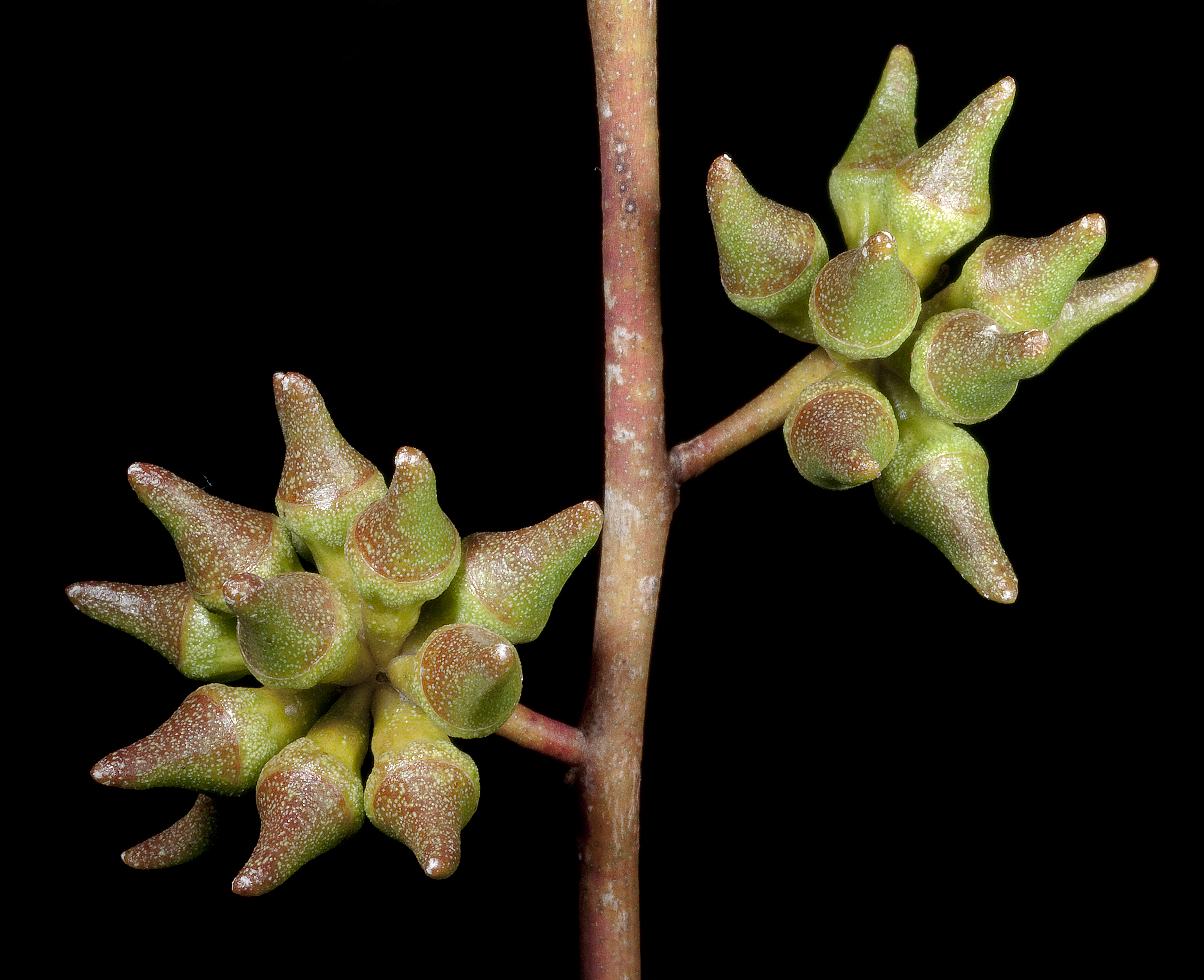 KRT3975